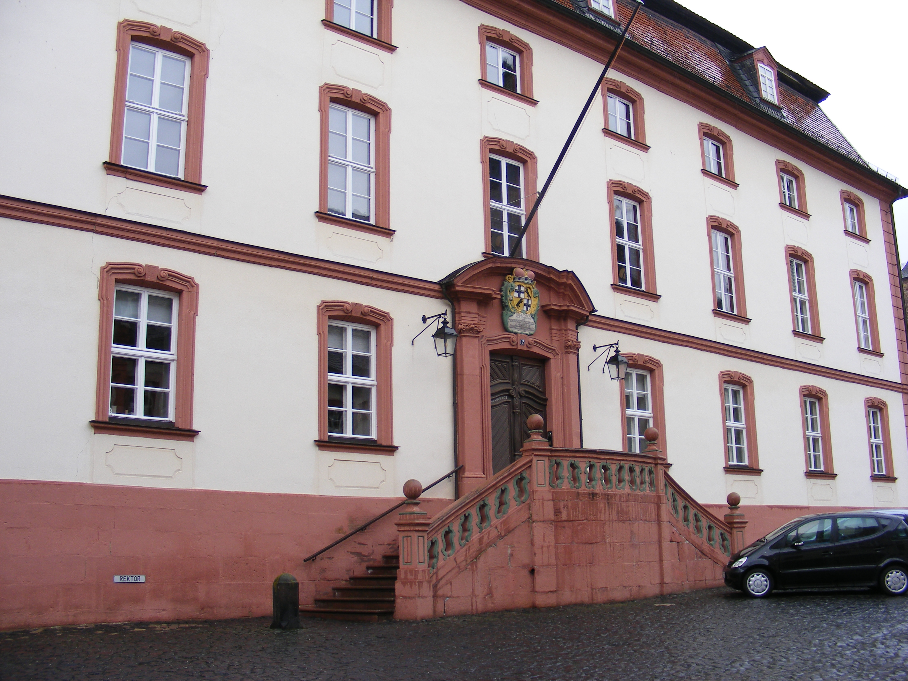 Fulda, Germany